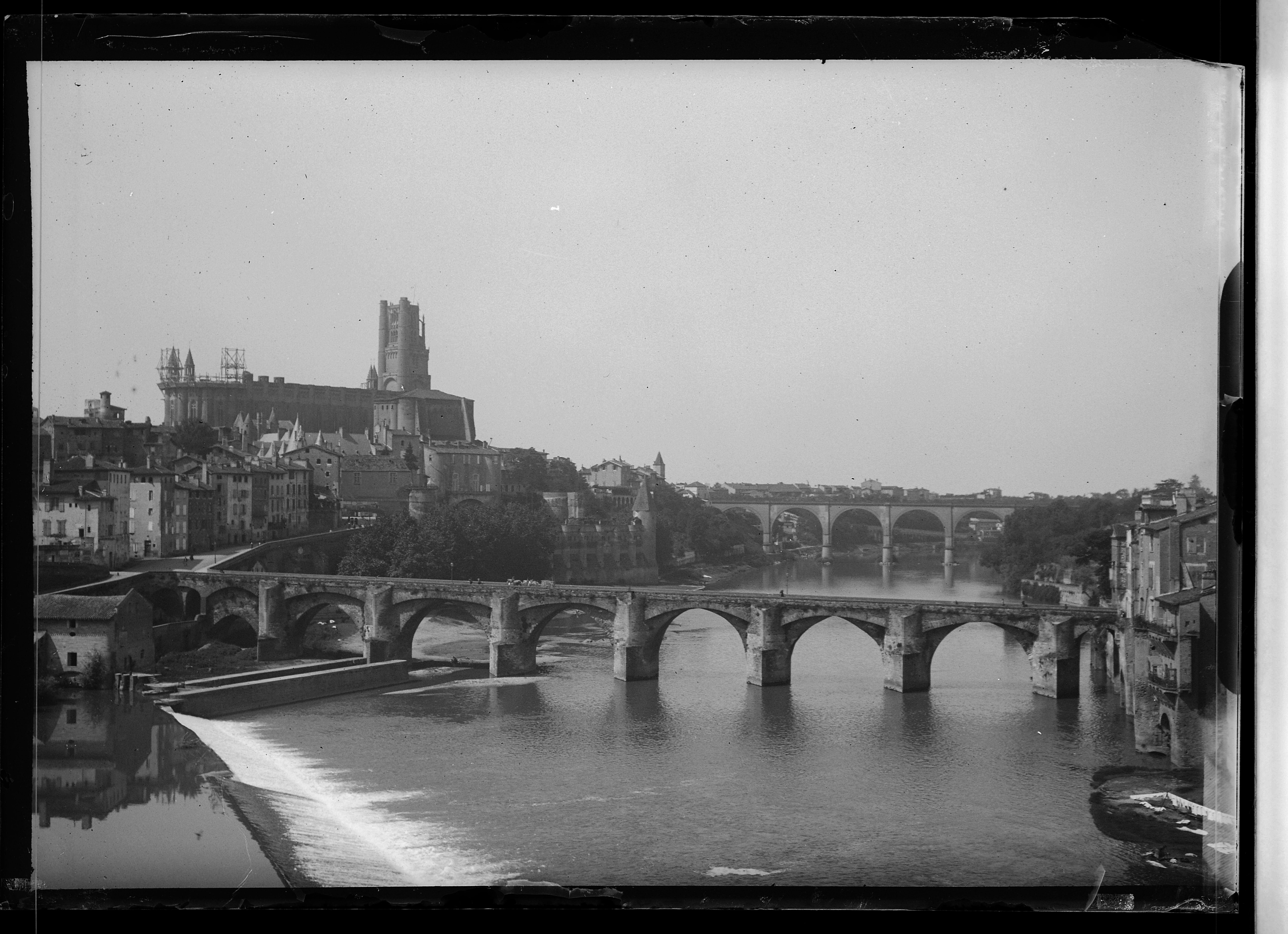 plaque négative au gélatino-bromure d'argent, format 6,5x9 cm. Inscription manuscrite par Eugène Trutat sur l'enveloppe : "8 juillet 1899 Albi - Ste Cécile et les ponts - aval Mackenstein"